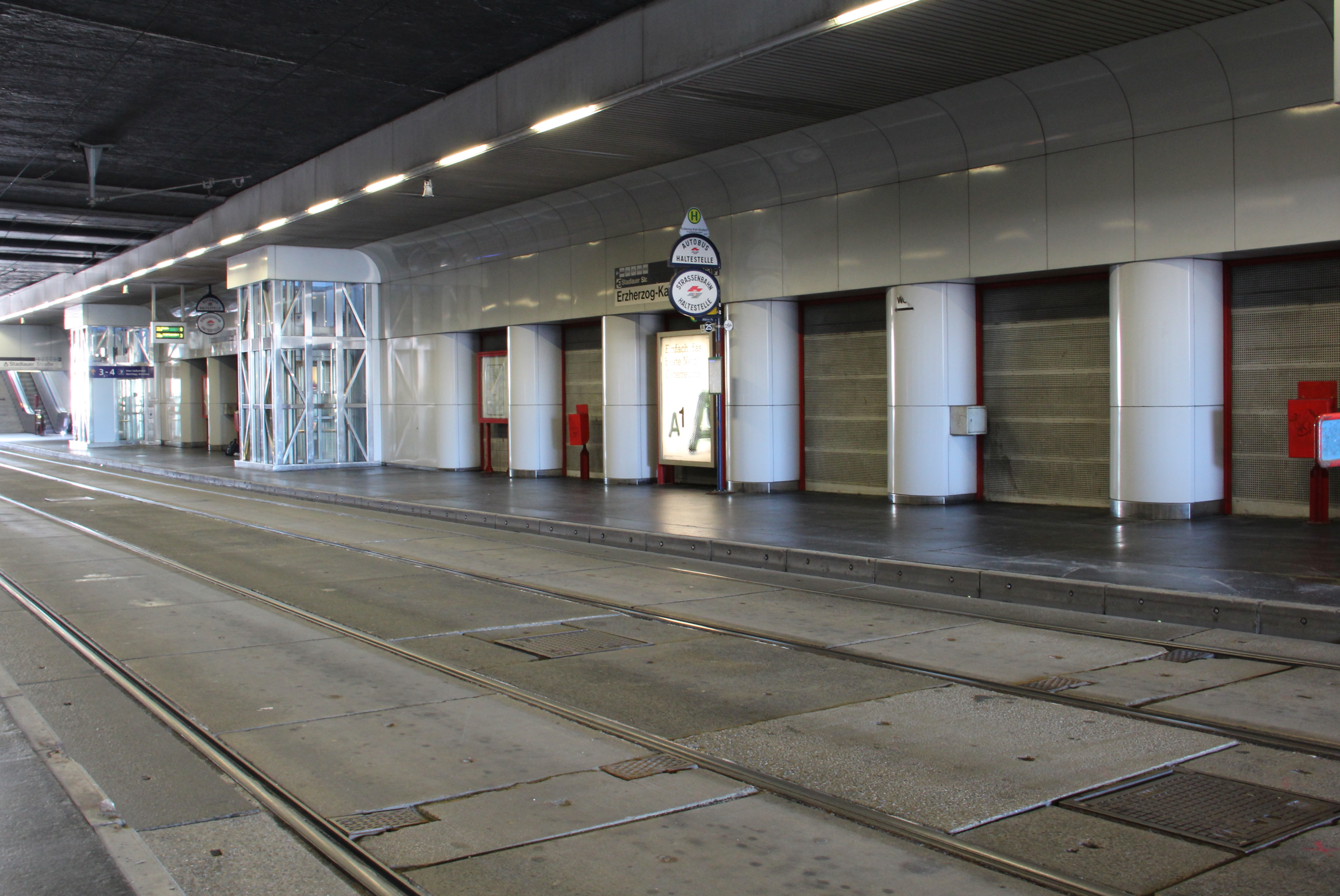 Die Station Erzherzog-Karl-Straße befindet sich in der Unterführung unter den Gleisen der Marchegger und Laaer Ostbahn. Hier halten planmäßig die Linien 25 und 26A.